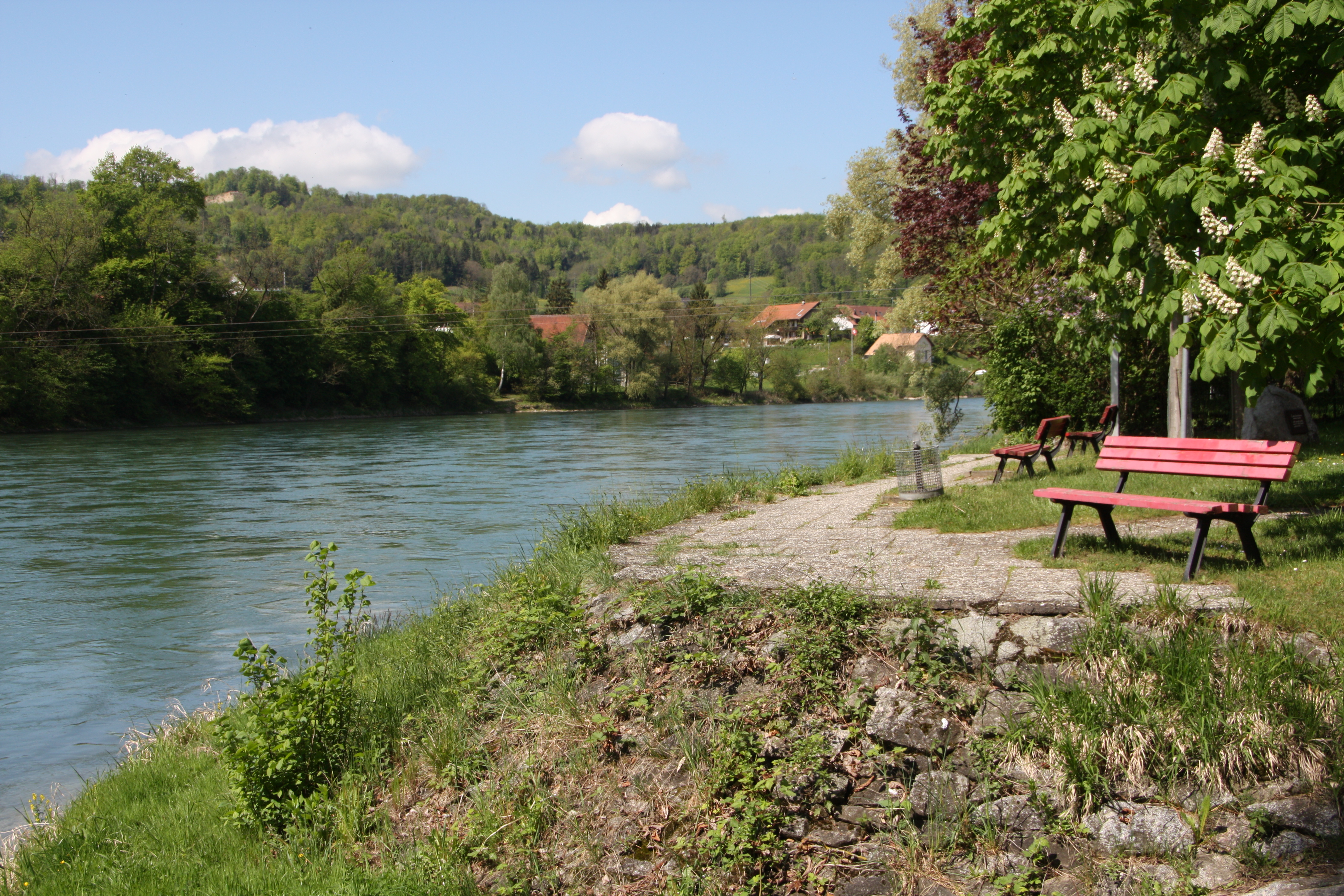 Ortschaft Reckingen, Ortsteil der Gemeinde Küssaberg im Landkreis Waldshut in Baden-Württemberg. Anlegeort der ehemaligen Fähre nach Rekingen (Schweiz).